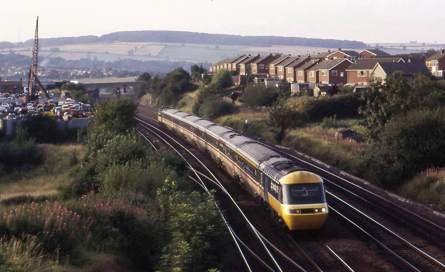 Tapton